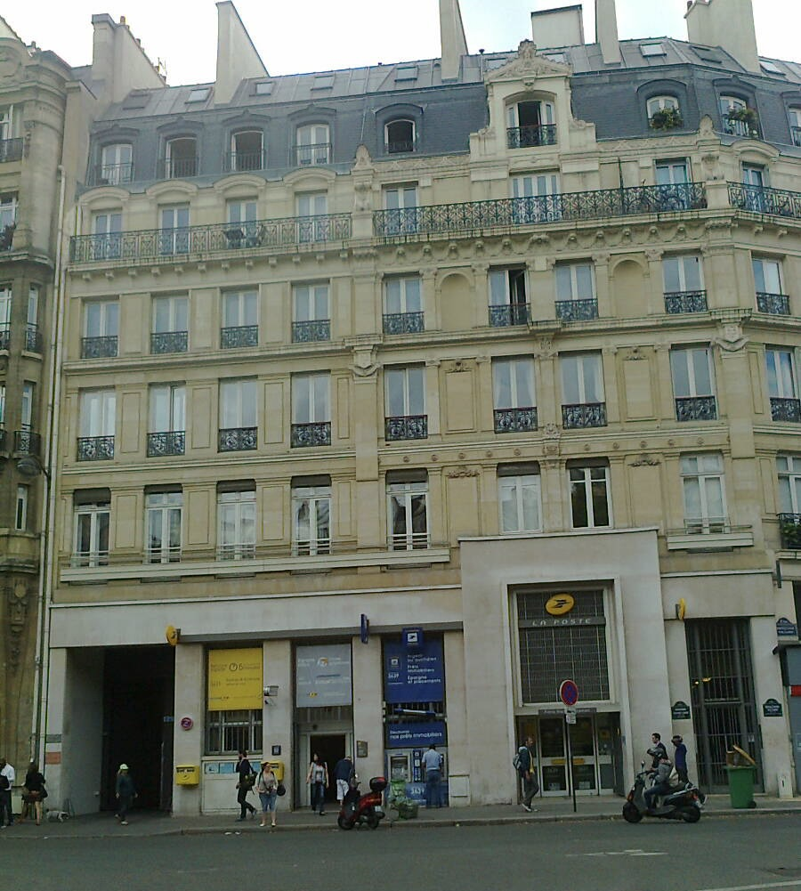 Construit en 1957, 58 boulevard Voltaire et 97 boulevard Richard-Lenoir, par l'architecte Joseph BUKIET (1896-1984). Le central téléphonique se trouve à l'arrière du bâtiment, la partie sur rue abritant un bureau de poste.